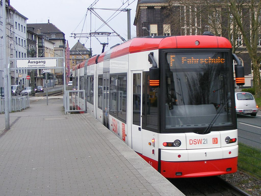 NGT8 (Bombardier Flexity) Dortmund/Germany Haltestelle Hafen